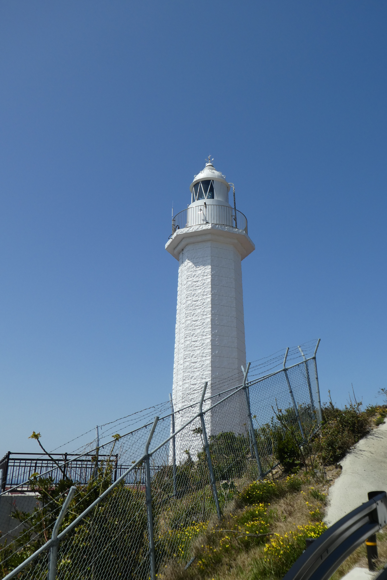 紀伊日ノ御埼灯台（和歌山県日高郡日高町）